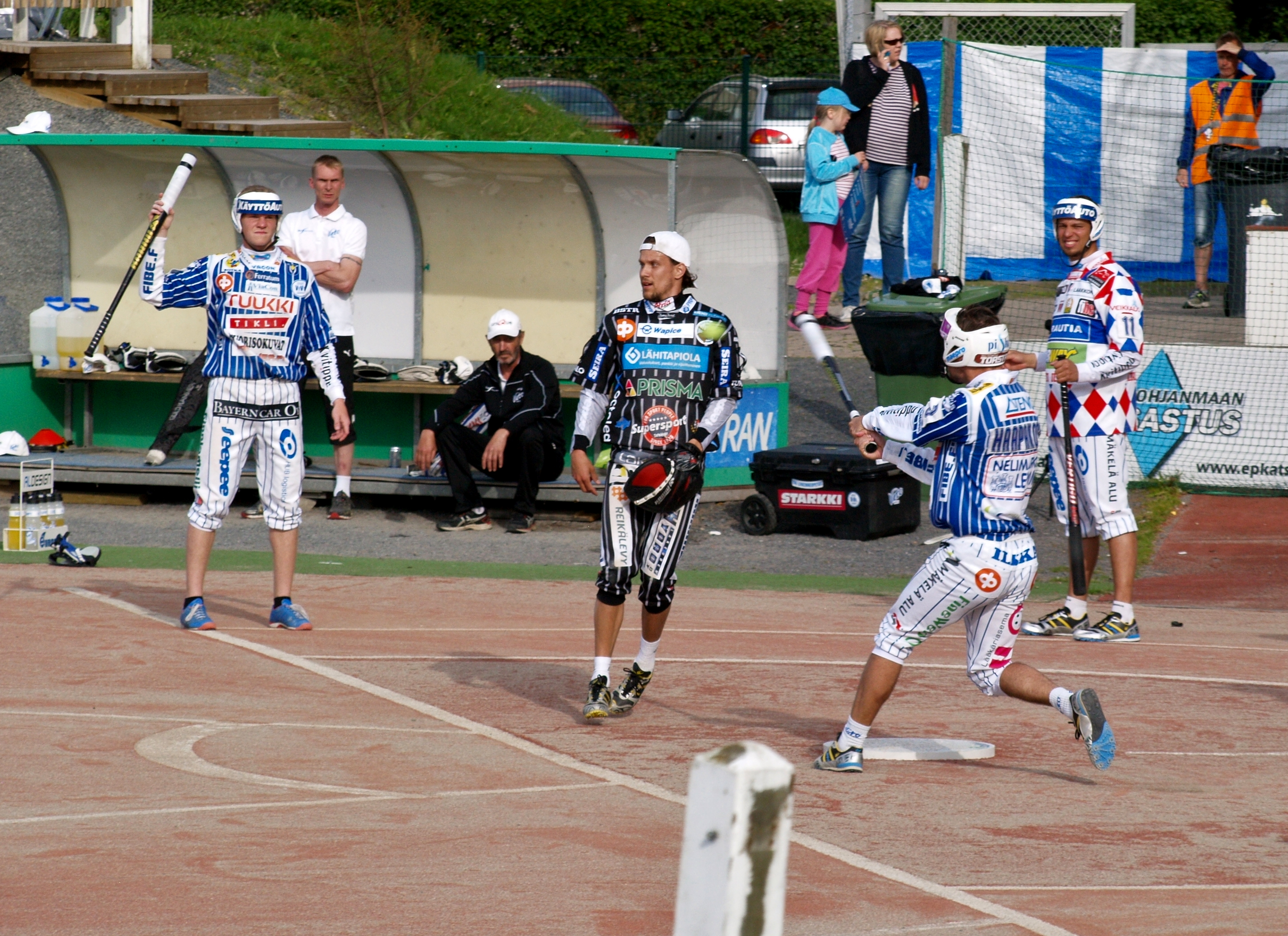 JymyJussit - Vimpelin Veto pesäpallo-ottelu 21.7.2015. Kuvassa lukkarina Ville Viita ja lyömässä Sami Haapakoski.